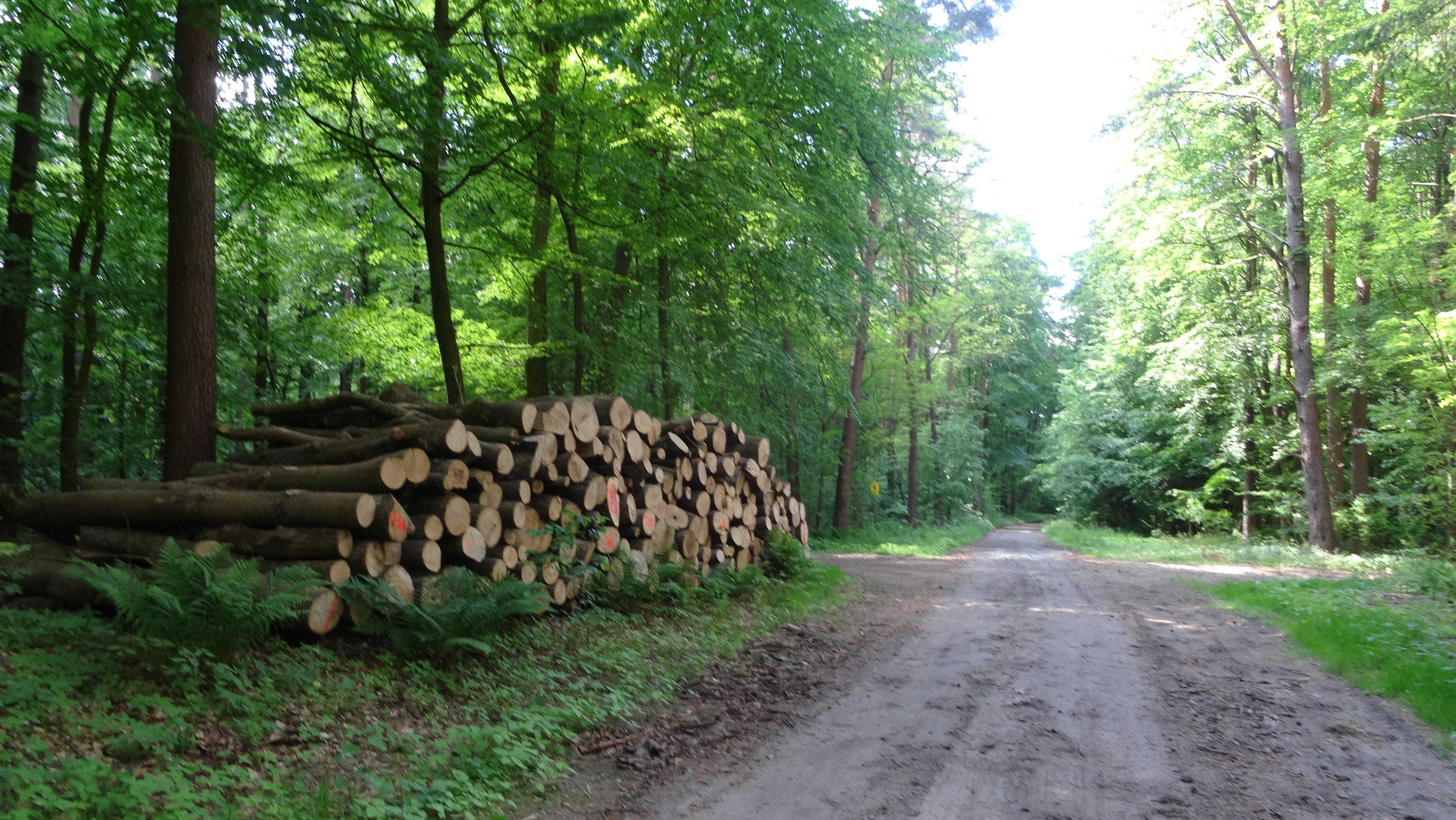 Bildtitel: Eichendorfer Mühle (05), Holzwirtschaft im Naturschutzgebiet FotoNummer: 5510 Bundesland: Brandenburg Schutzgebiet 1: Naturpark(NP) "Naturpark Märkische Schweiz" Gebiets-Nummer: 3450-701 Schutzgebiet 2: Landschaftsschutzgebiet(LSG) "Naturpark Märkische Schweiz" Gebiets-Nummer: 3450-601 Schutzgebiet 3: Fauna-Flora-Habitat-Gebiet (FFH) "Schermützelsee" Gebiets-Nummer: DE 3450-307 Schutzgebiet 4: Special Protection Area (Vogelschutzgebiet) (SPA) "Märkische Schweiz" Gebiets-Nummer: DE DE 3450-401 Schutzgebiet 5: Naturschutzgebiet (NSG) "Stobbertal" Gebiets-Nummer: 3450-501 Ortsangabe: Sandstraße Richtung Stobbertal